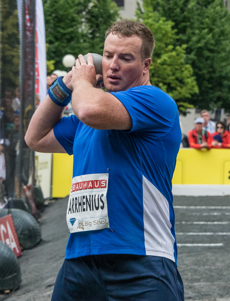 Niklas Arrhenius under Bauhaus-galan (Diamond League) i Kungsträdgården i Stockholm den 29 juli 2015.